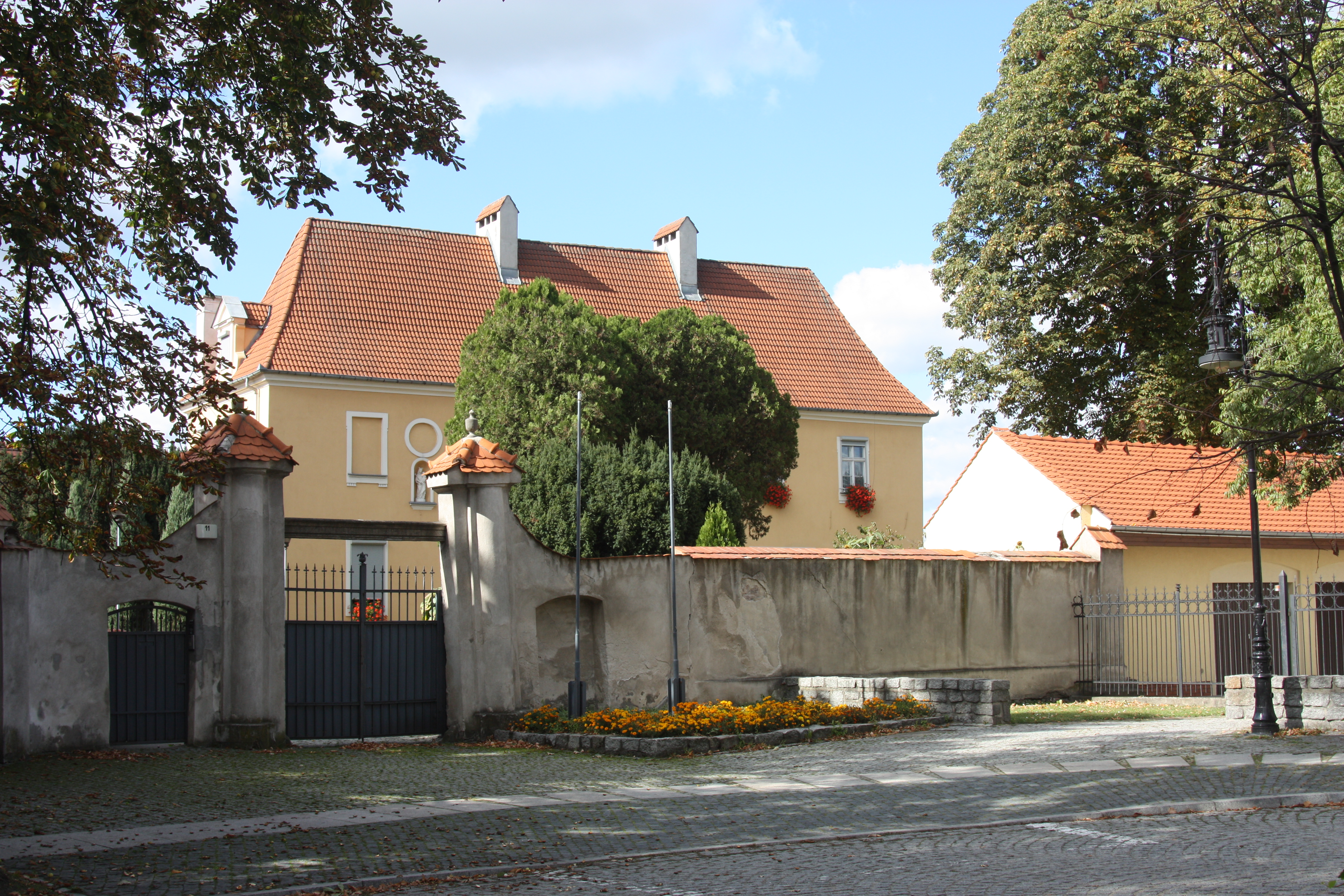 Poznań, ul. Ostrów Tumski 11 - kanonia, widok od Panny Marii (zabytek nr A 065)